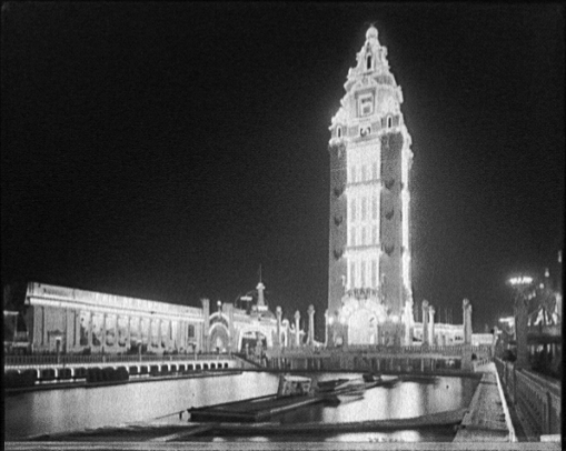 Dreamland-Vergnügungspark auf Coney Island bei Nacht, Coney Island, New York.